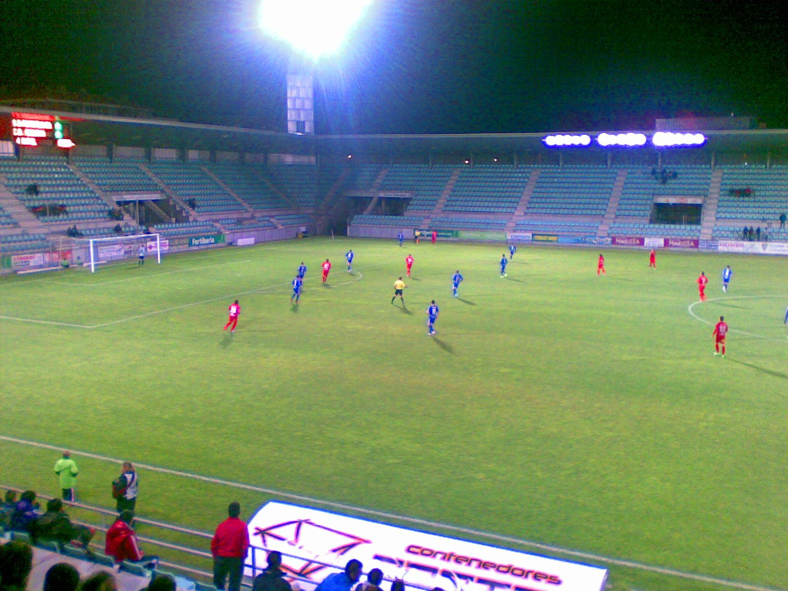 Final Copa Castilla y León 2013-14 Numancia Ponferradina Estadio Nueva Balastera Palencia